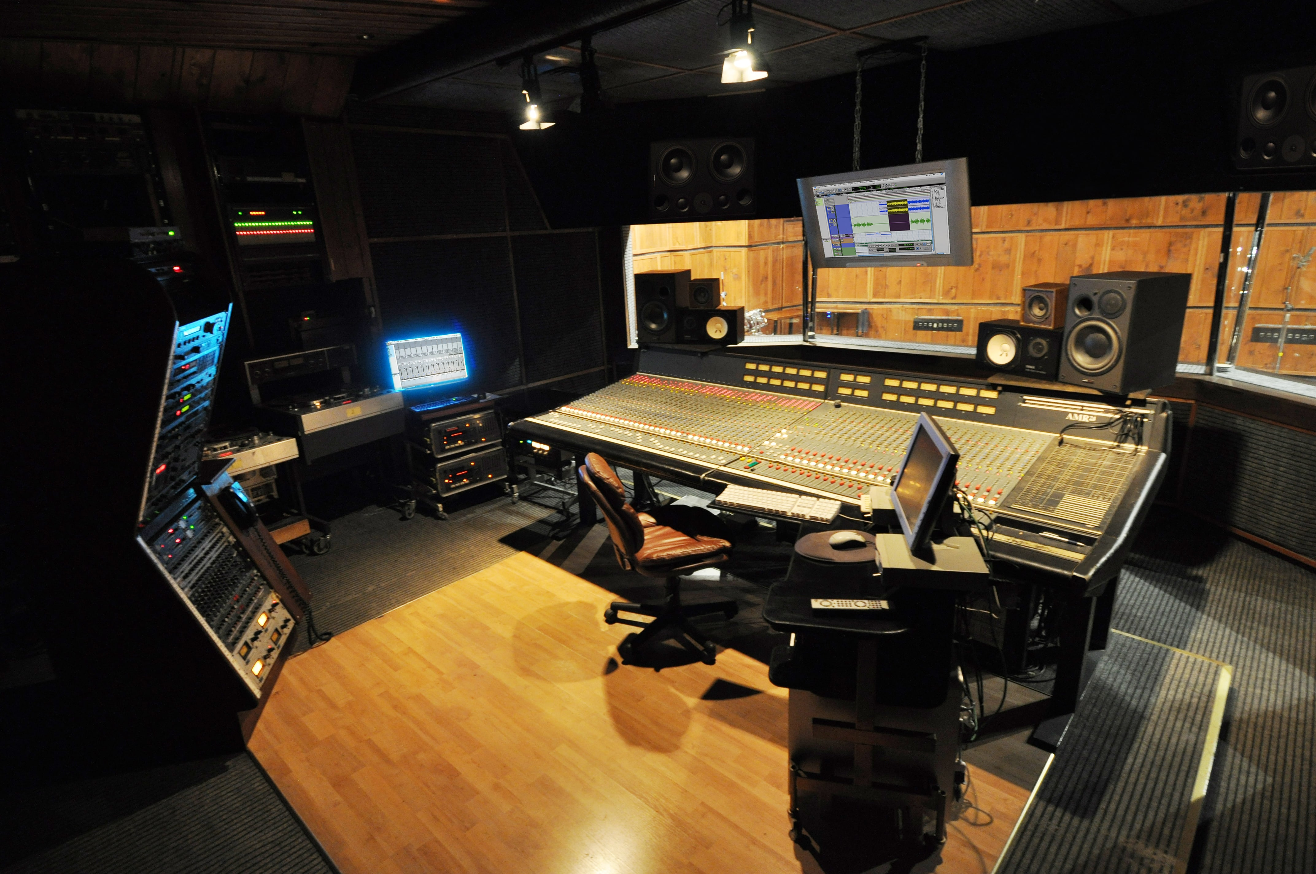 חדר הבקרה של האולפן האפור